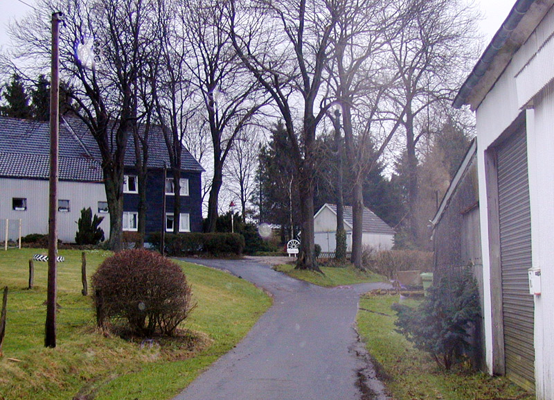 Heidt, Radevormwald, 2002 selbst fotografiert, GFDL